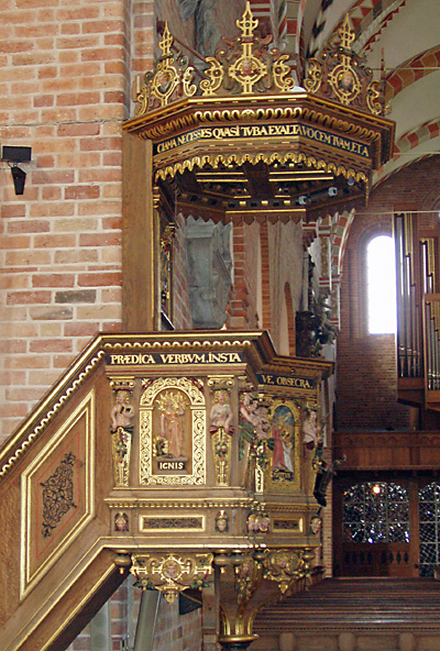 Prædikestolen i St. Bendts Kirke , Ringsted, Denmark